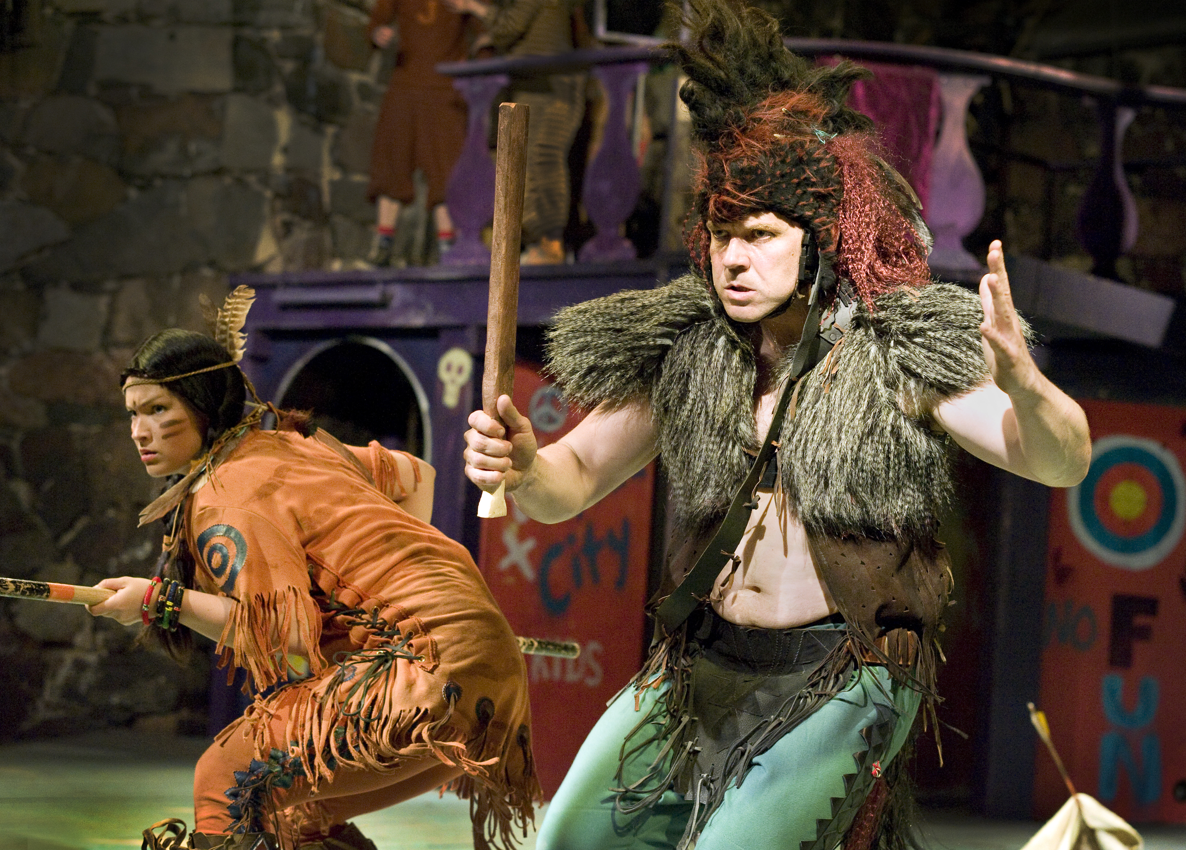 Tiikerililja - Annika Poijärvi, Pehmeä Pilvi - Aarni Kivinen Kuva: Ryhmäteatteri / Tanja Ahola